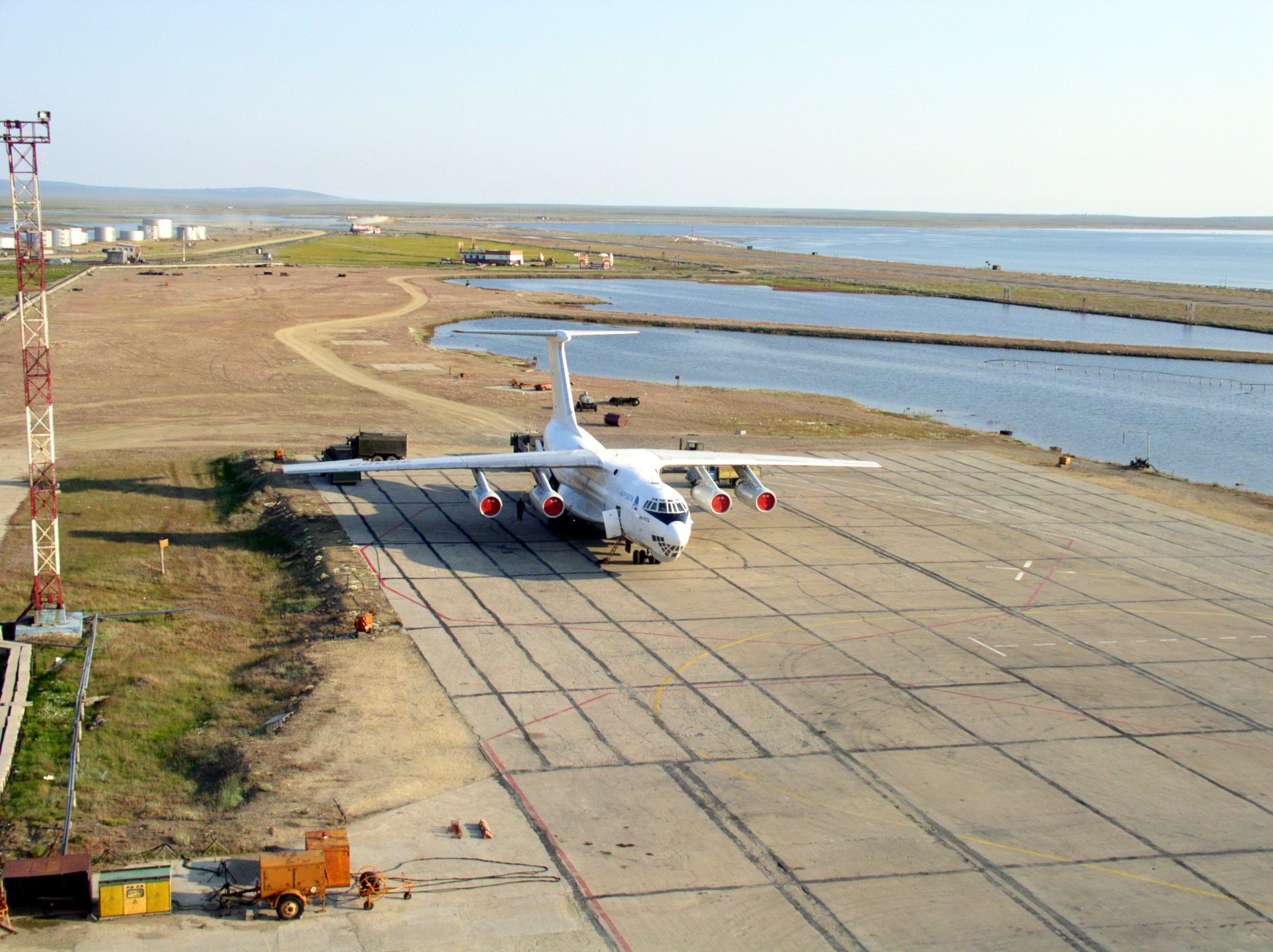 Аэропорт Апапельгино